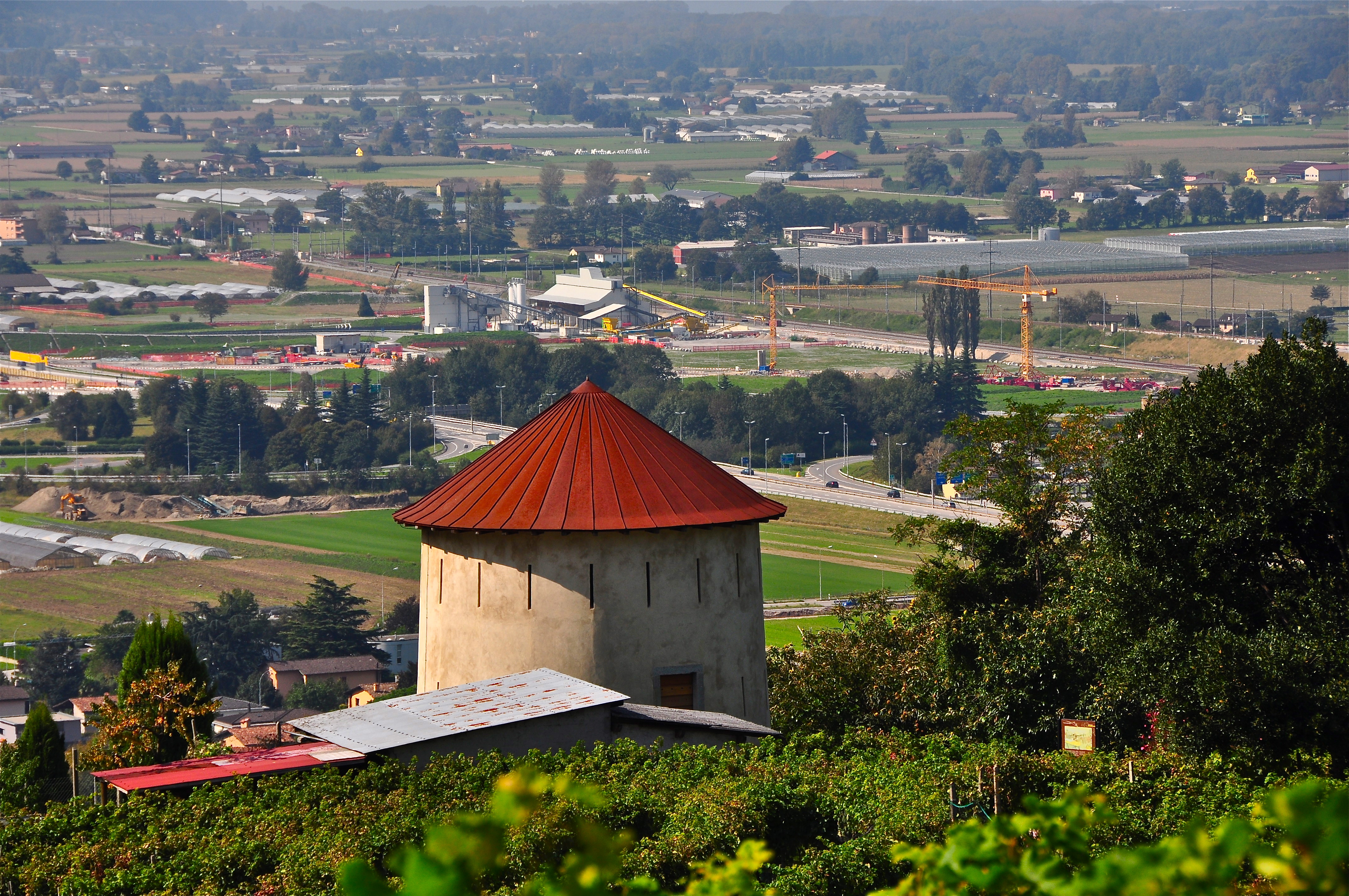 Vista superiore della Ai Scarsitt (Torre 1)